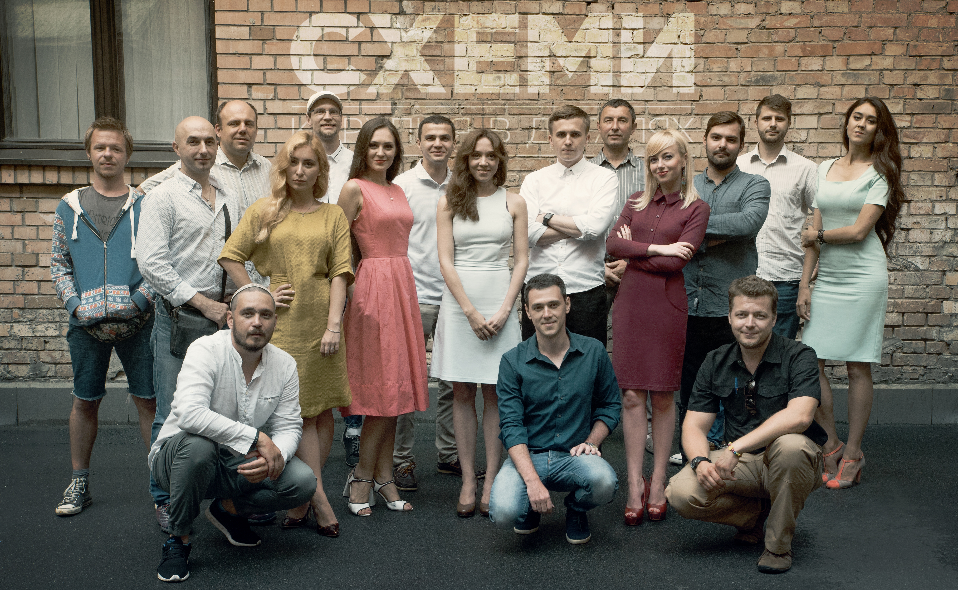 Колектив програми «Схеми: корупція в деталях»